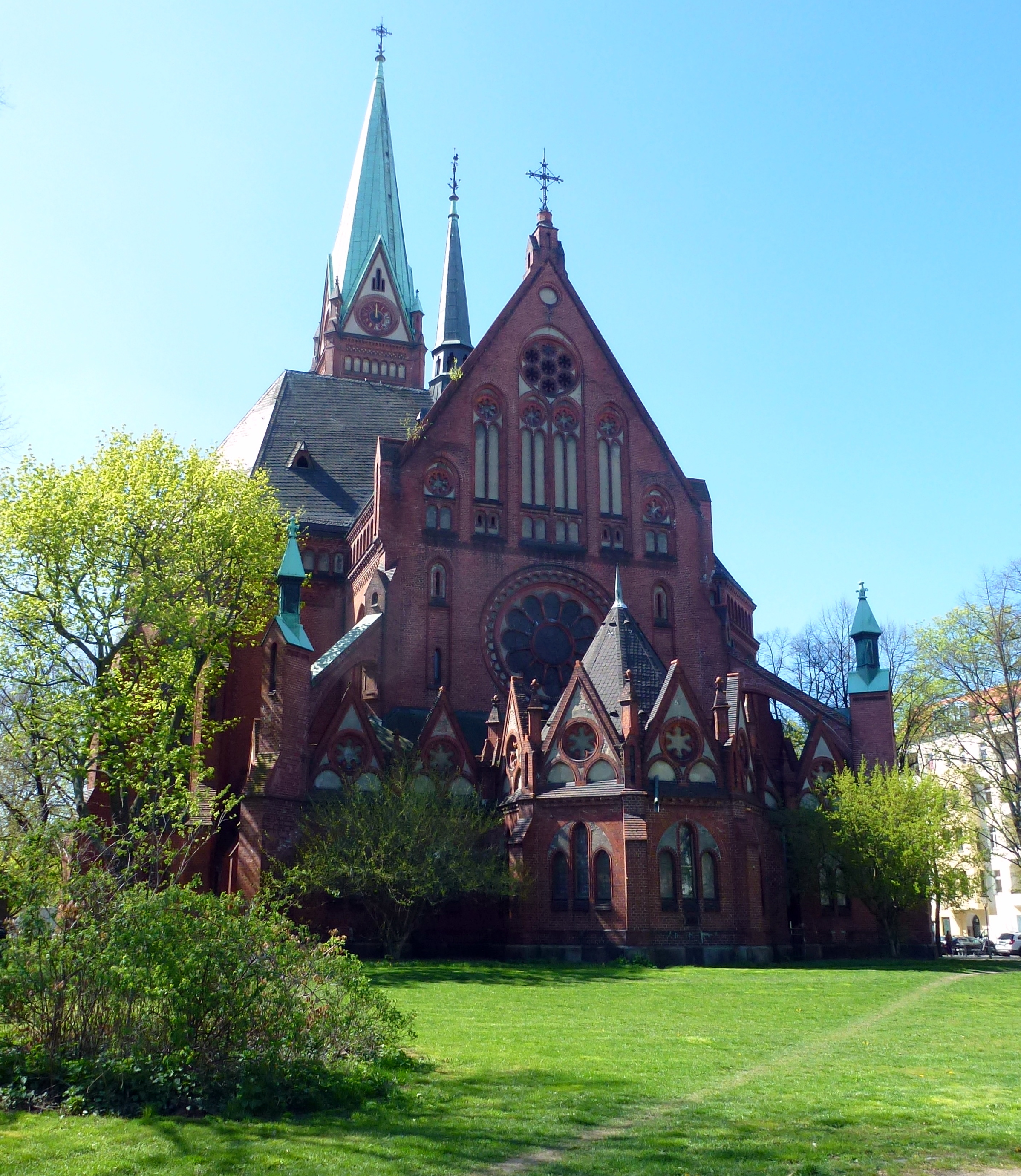 Berlin-Wedding Neue Nazarethkirche